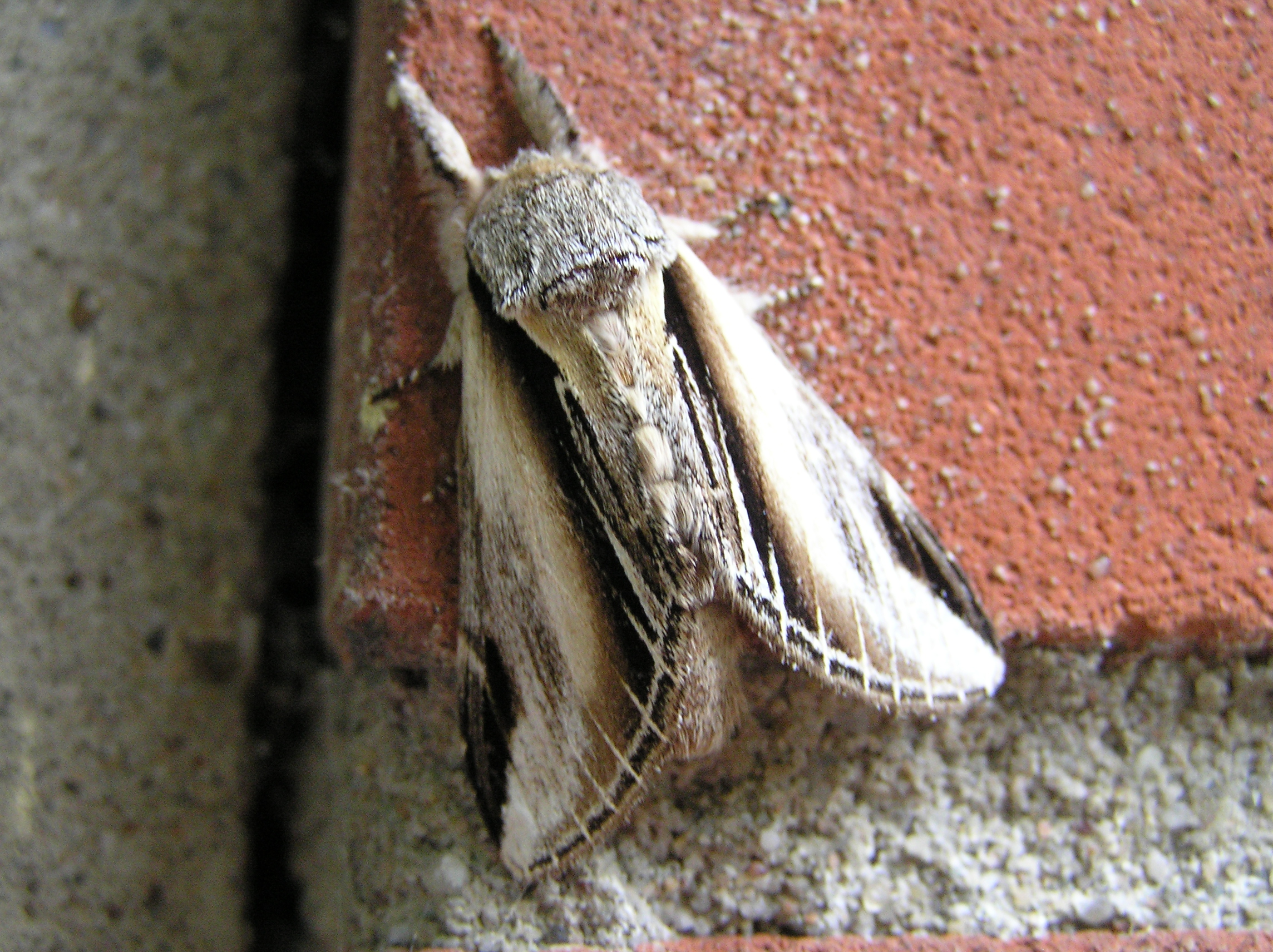 Pheosia tremula